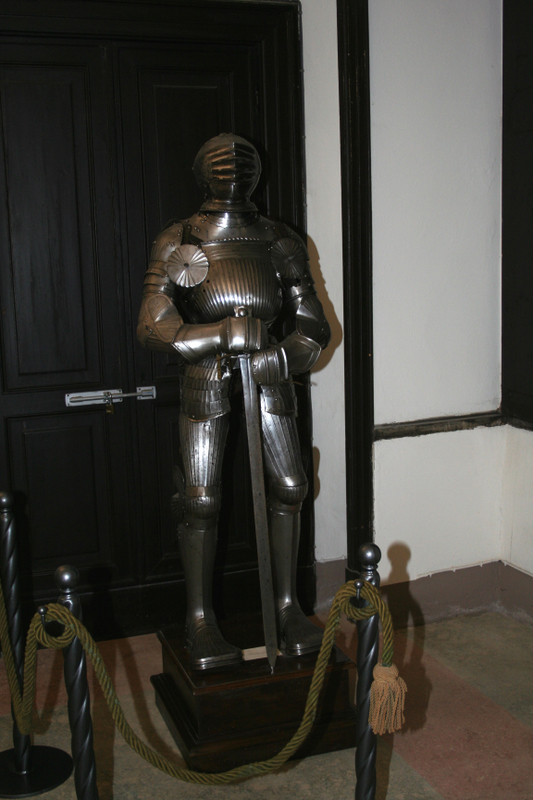 Armatura completa da cavallo, XVI sec., Palazzo Duranti-Marzoli, Palazzolo sull'Oglio.